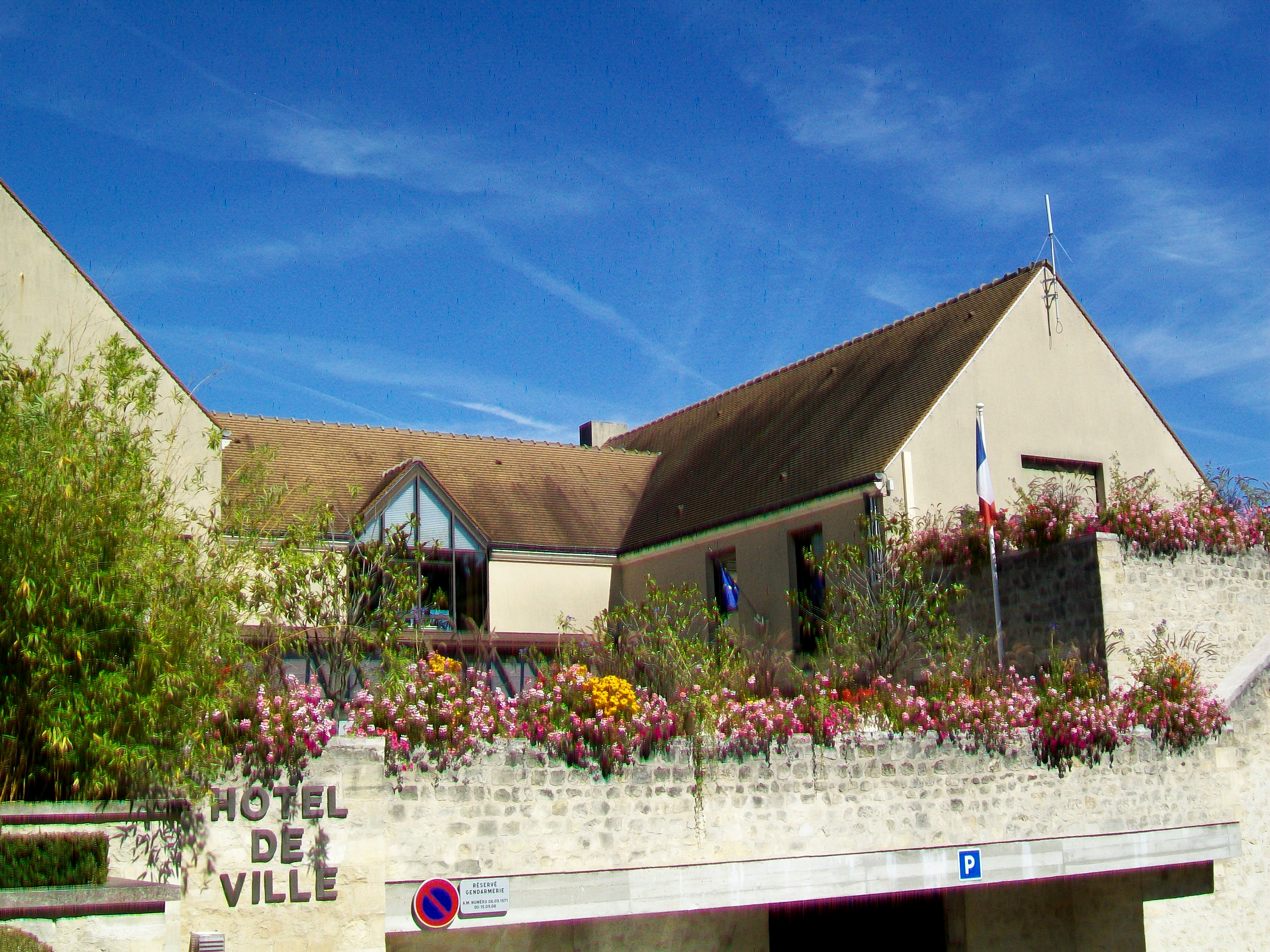 La mairie, rue Vieille Saint-Martin, au chevet de l'église Saint-Martin. La gendarmerie nationale se trouve dans le même bâtiment.